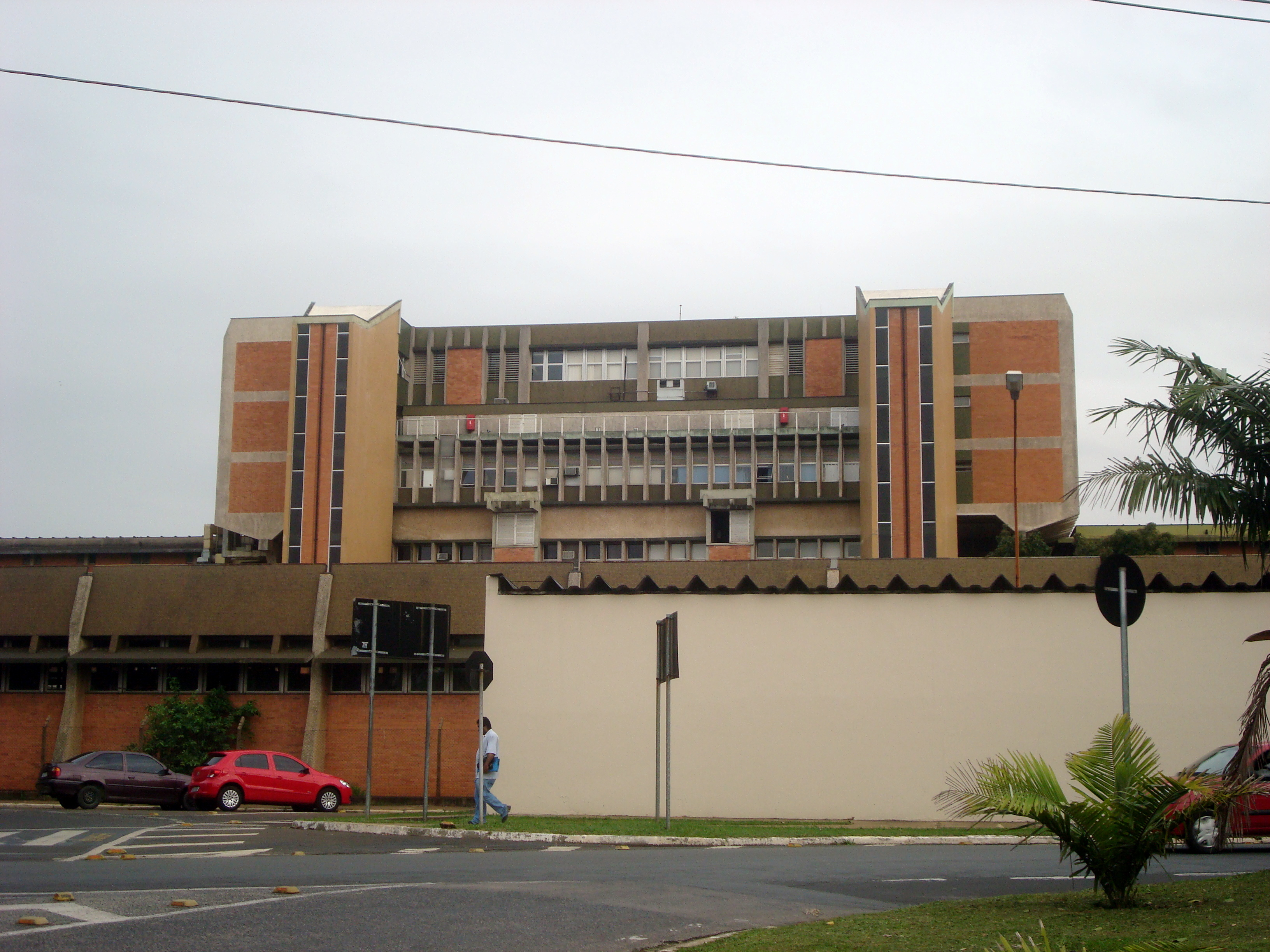 Hospital 2